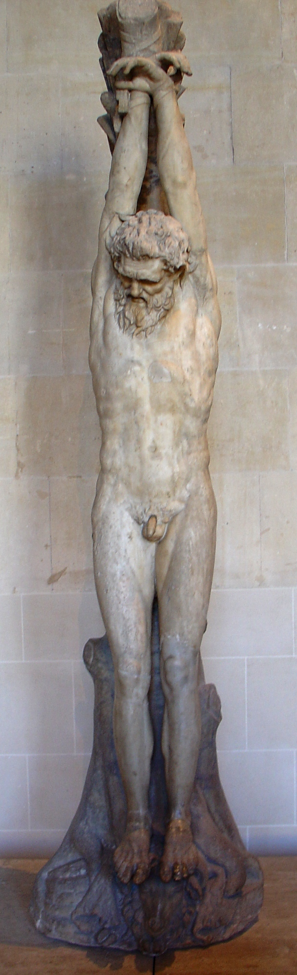 ρωμαϊκό αντίγραφο από ελληνικό χάλκινο πρωτότυπο του Φειδία (περ. 460 Π.Κ.Χ.).